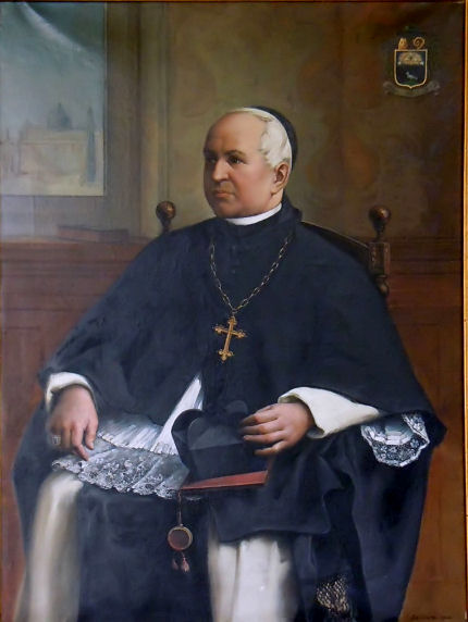 Portret generaal abt Henricus Smeulders door Coene, Jan Baptist ca 1900